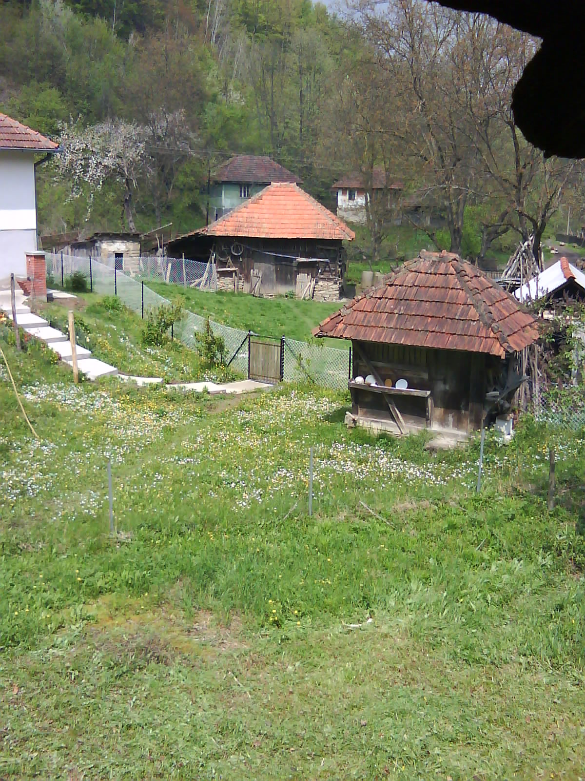 Dulene. Autor Nenad Marković